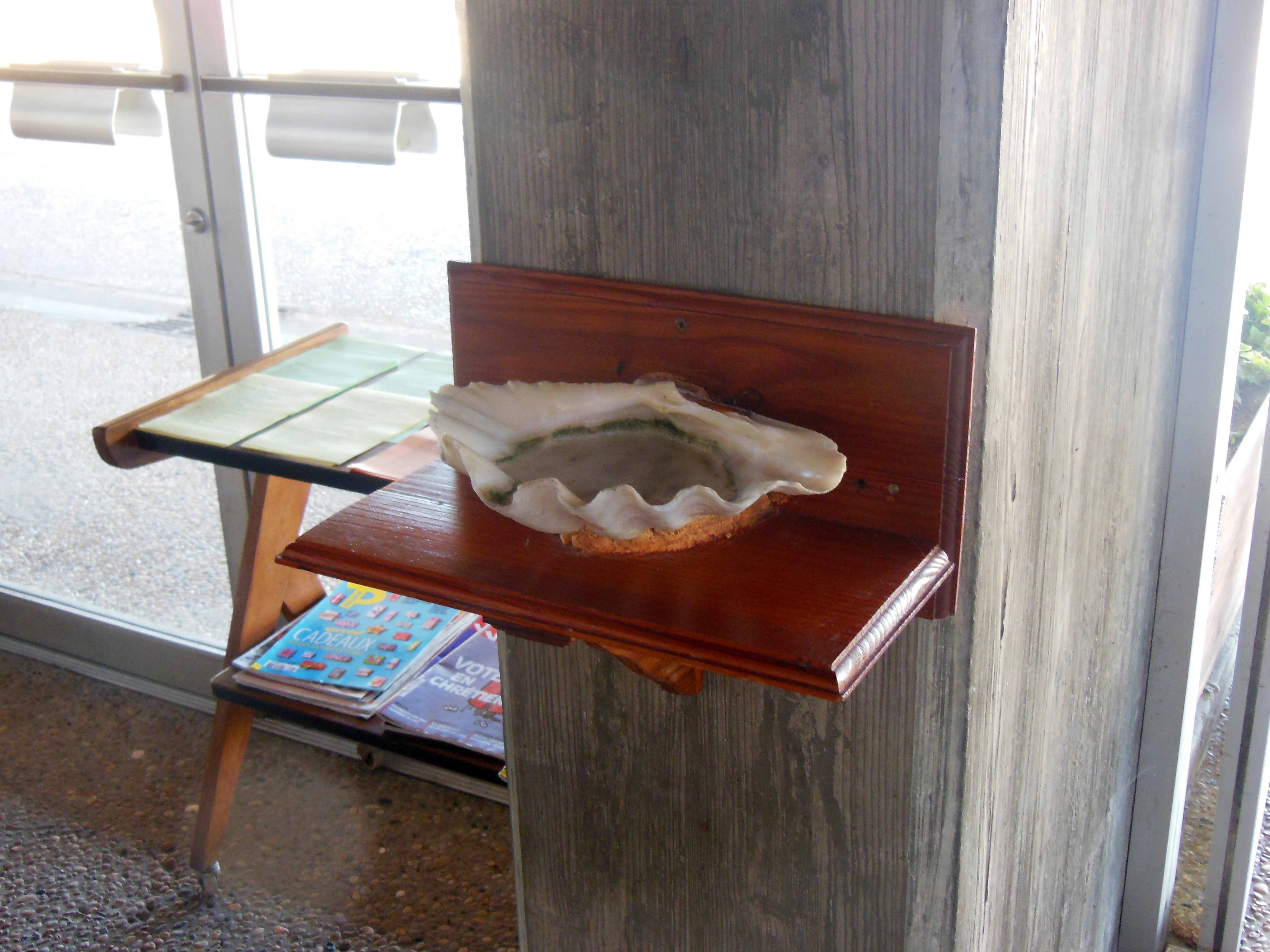 Chapelle Notre-Dame des Dunes de Mimizan-Plage (Landes, France). Le bénitier